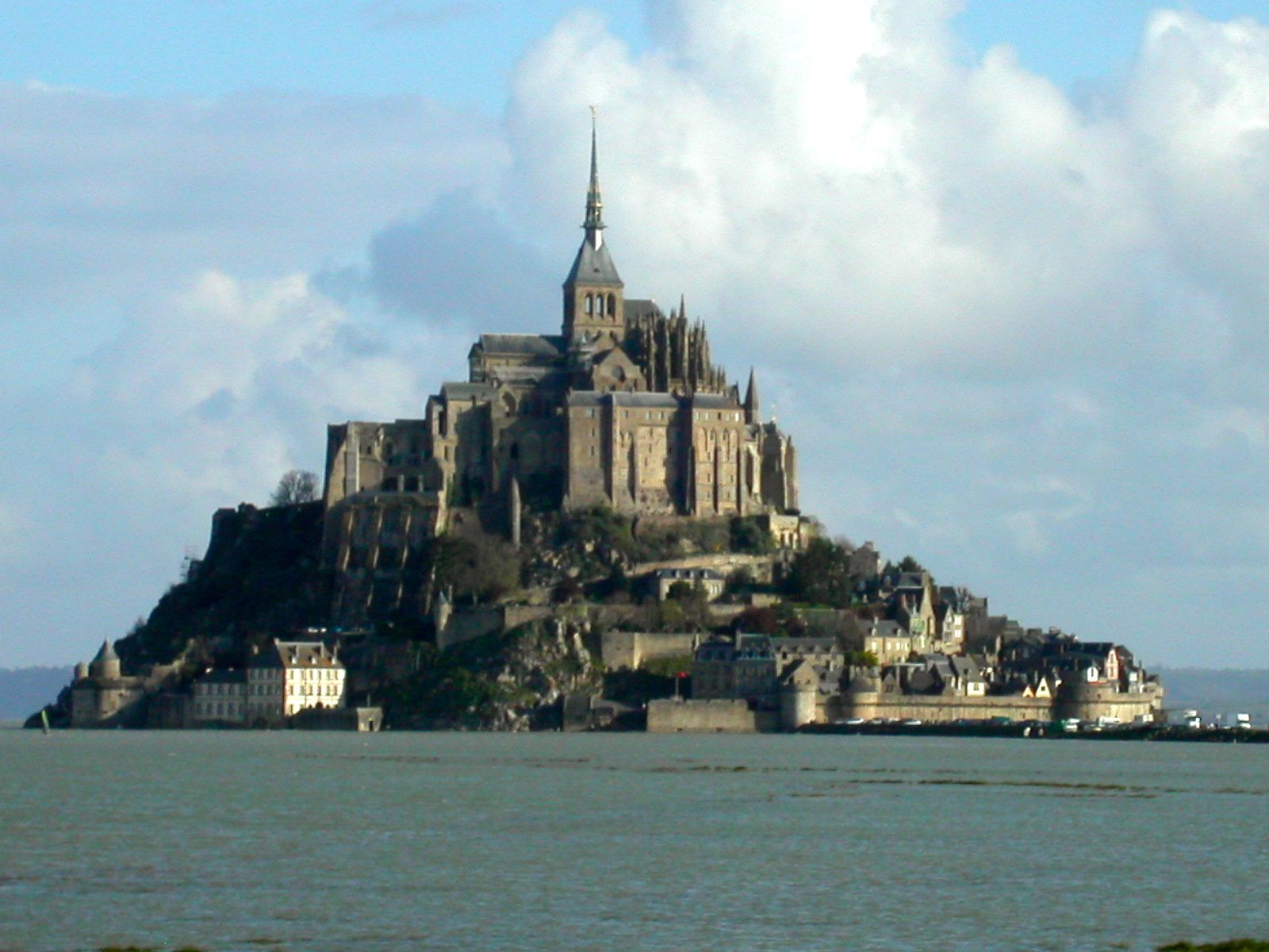 Mont St Michel